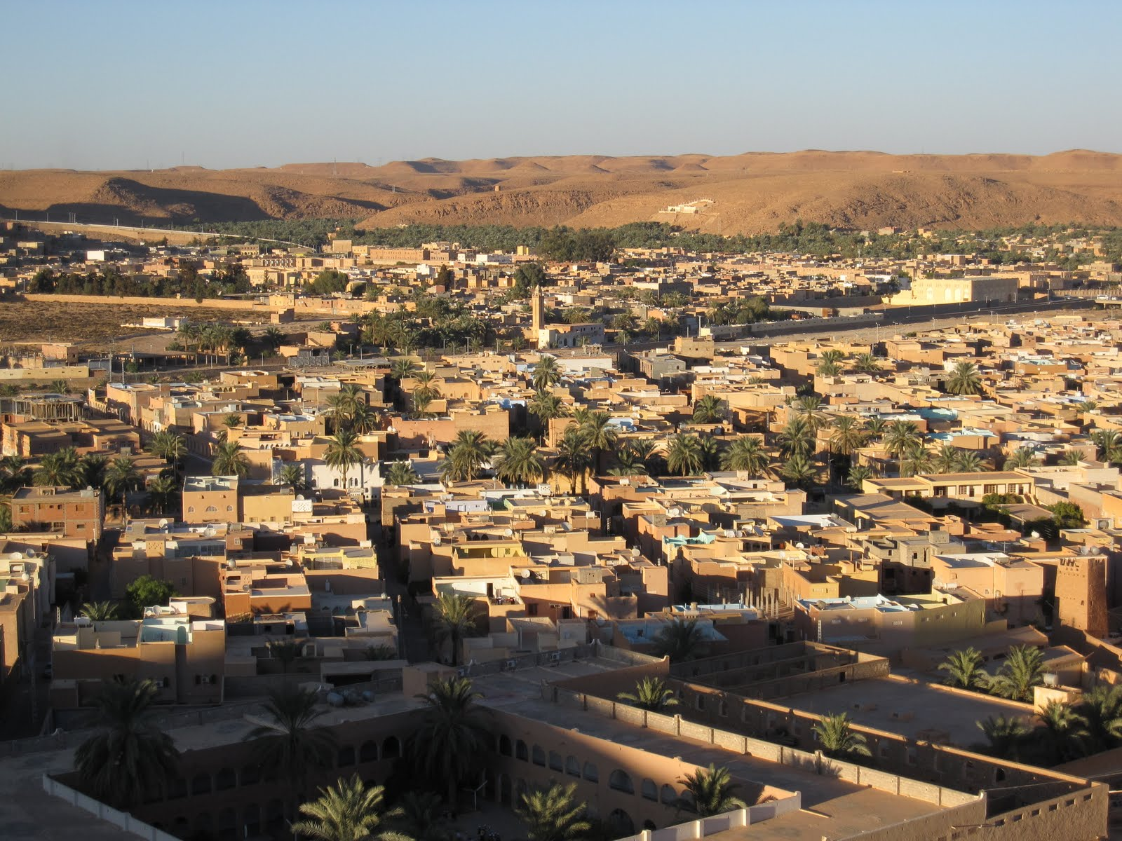 Sunset over Ghardaia